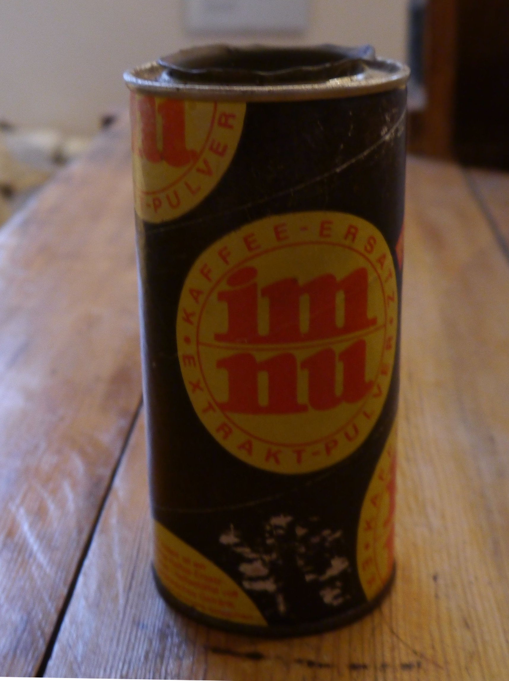 Imnu Kaffee-Ersatz-Extrakt-Pulver DDR